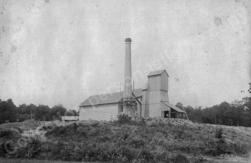 Le puits du Tonnet, dont les installations viennent d’être construites.